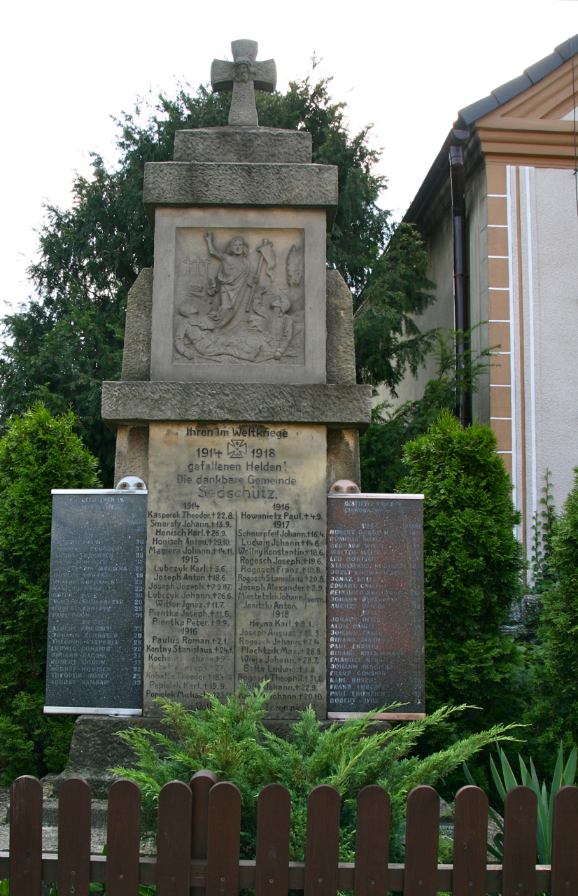 Dziedzice (dodatkowa nazwa w j. niem. Sedschütz) – wieś w Polsce położona w województwie opolskim, w powiecie krapkowickim, w gminie Strzeleczki.